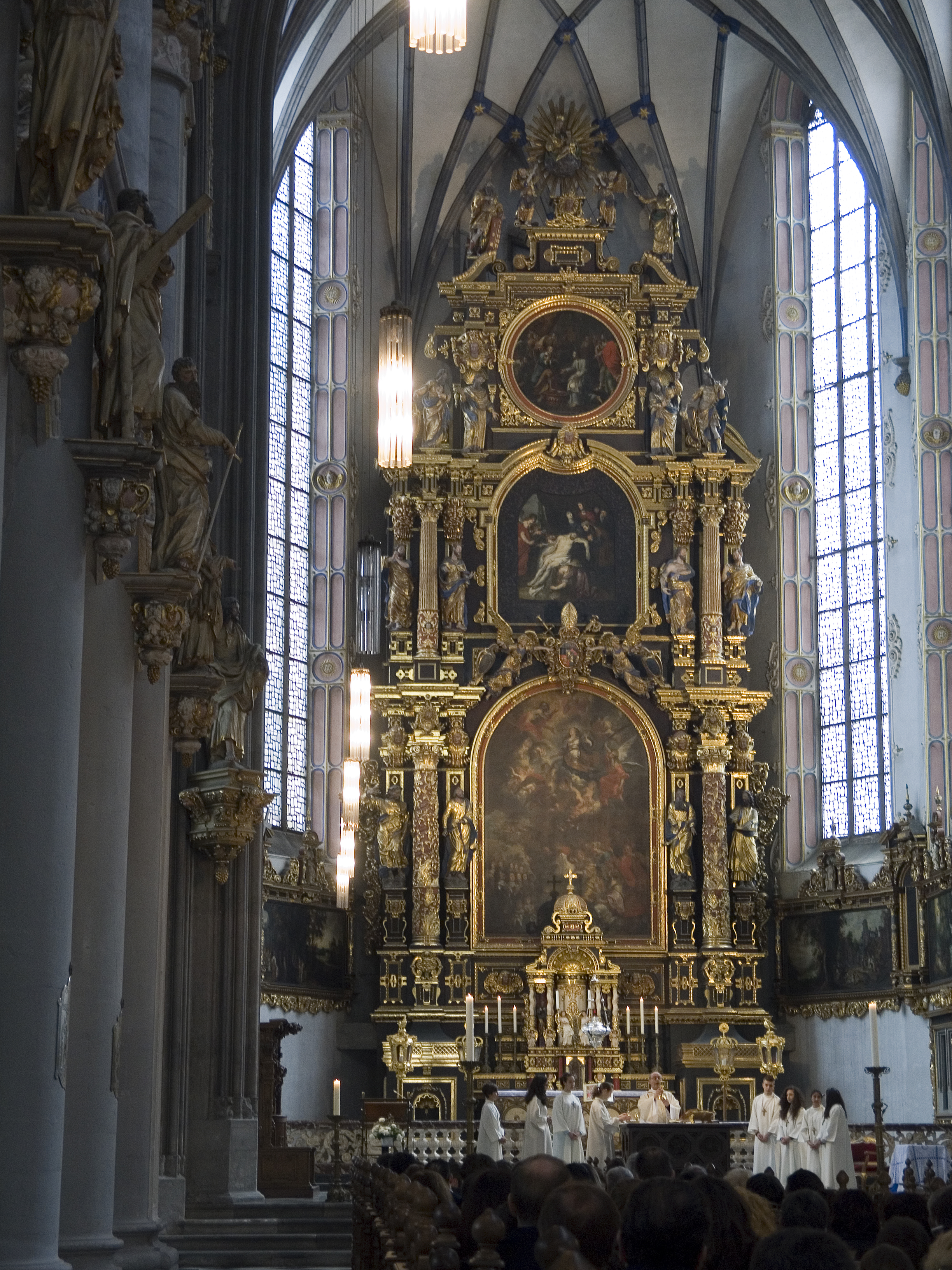 Северный Рейн - Вестфалия, Кёльн - Церковь Успения Пресвятой Богородицы